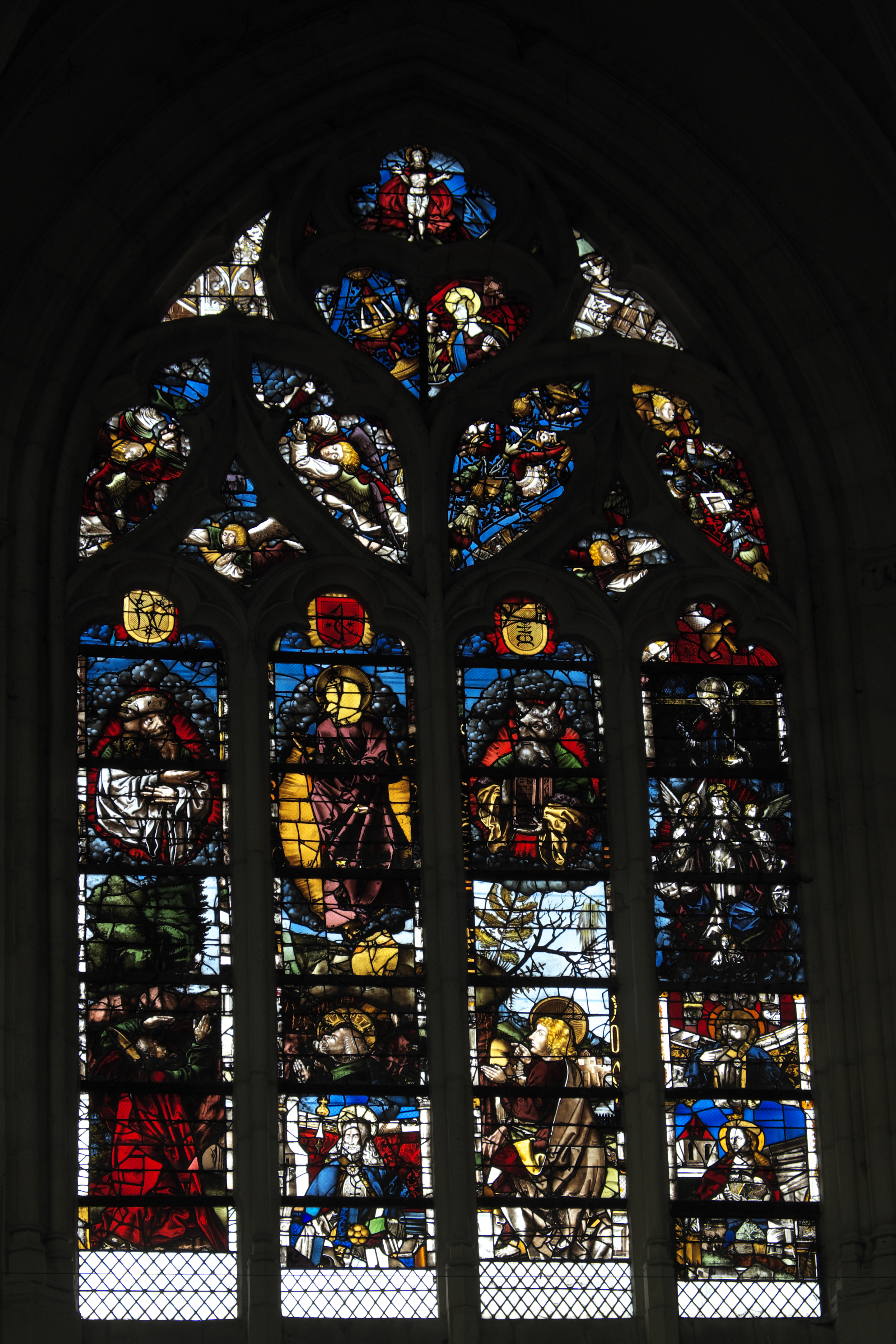 Bleiglasfenster (Baie 111) in der Basilika Saint-Nicolas in Saint-Nicolas-de-Port im Département Meurthe-et-Moselle (Lothringen/Frankreich), aus der Zeit um 1514—1520, von Valentin Bousch; Darstellung: Verklärung Christi, umgeben von den Aposteln Jakobus, Petrus, Johannes und den Propheten Moses und Elias